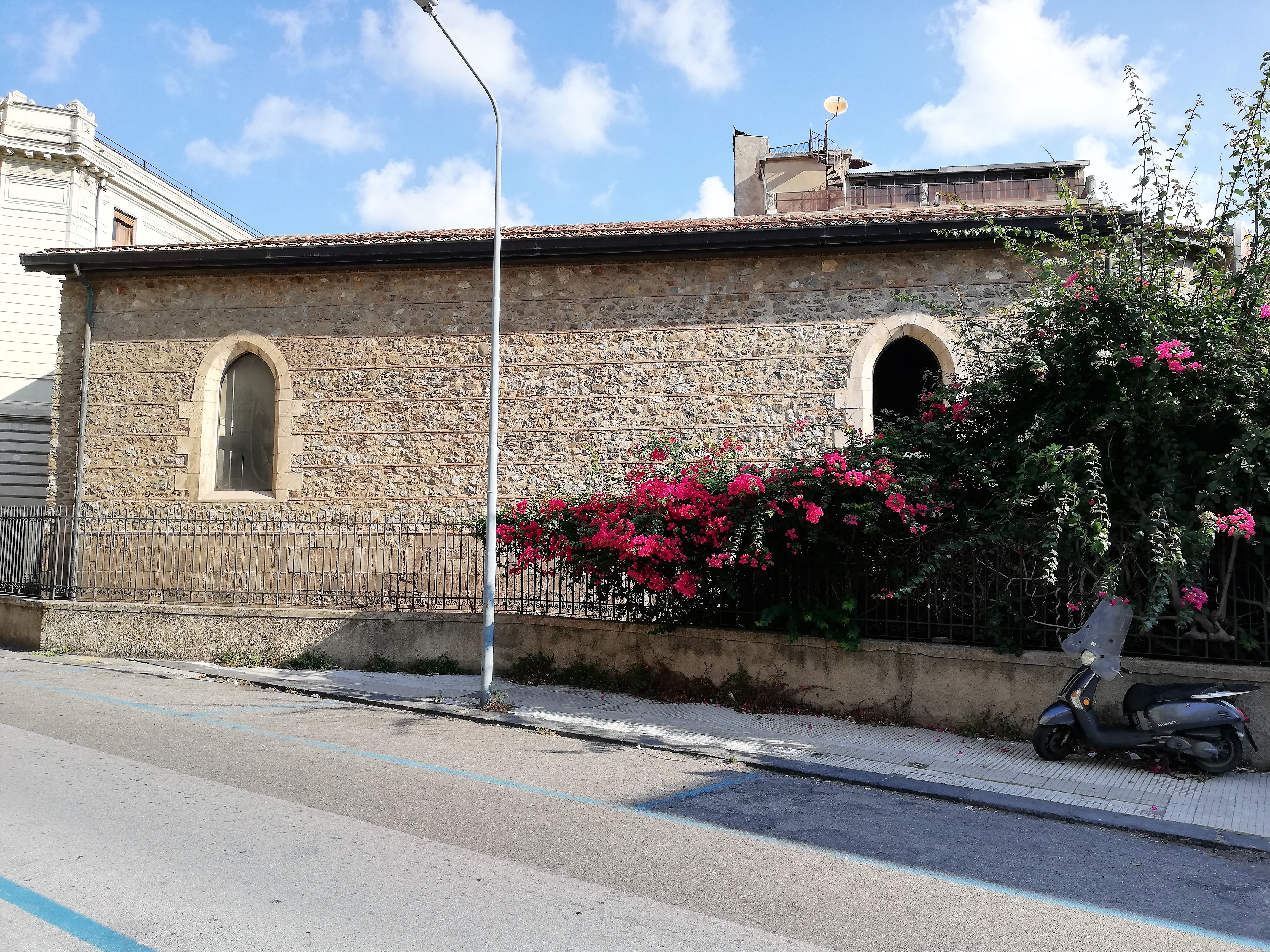 chiesa di Santa Maria Alemanna This is a photo of a monument which is part of cultural heritage of Italy.